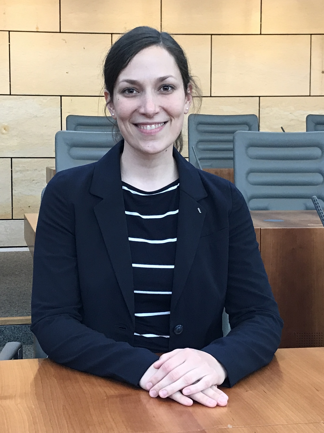 Heike Wermer im Plenarsaal im Düsseldorfer Landtag.